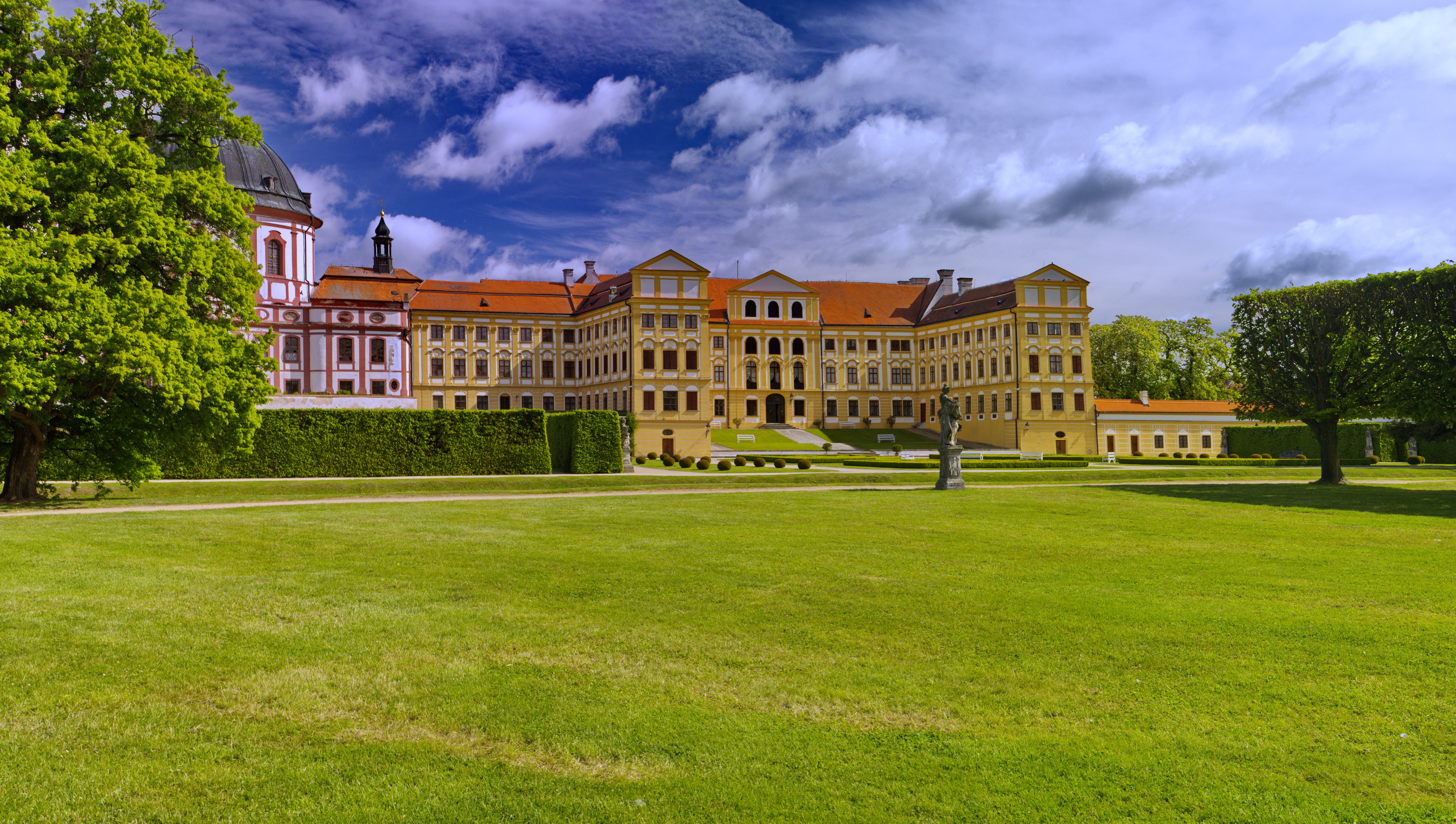 Zámek Jaroměřice nad Rokytnou, nám. Míru 1, Jaroměřice nad Rokytnou, Jaroměřice nad Rokytnou.